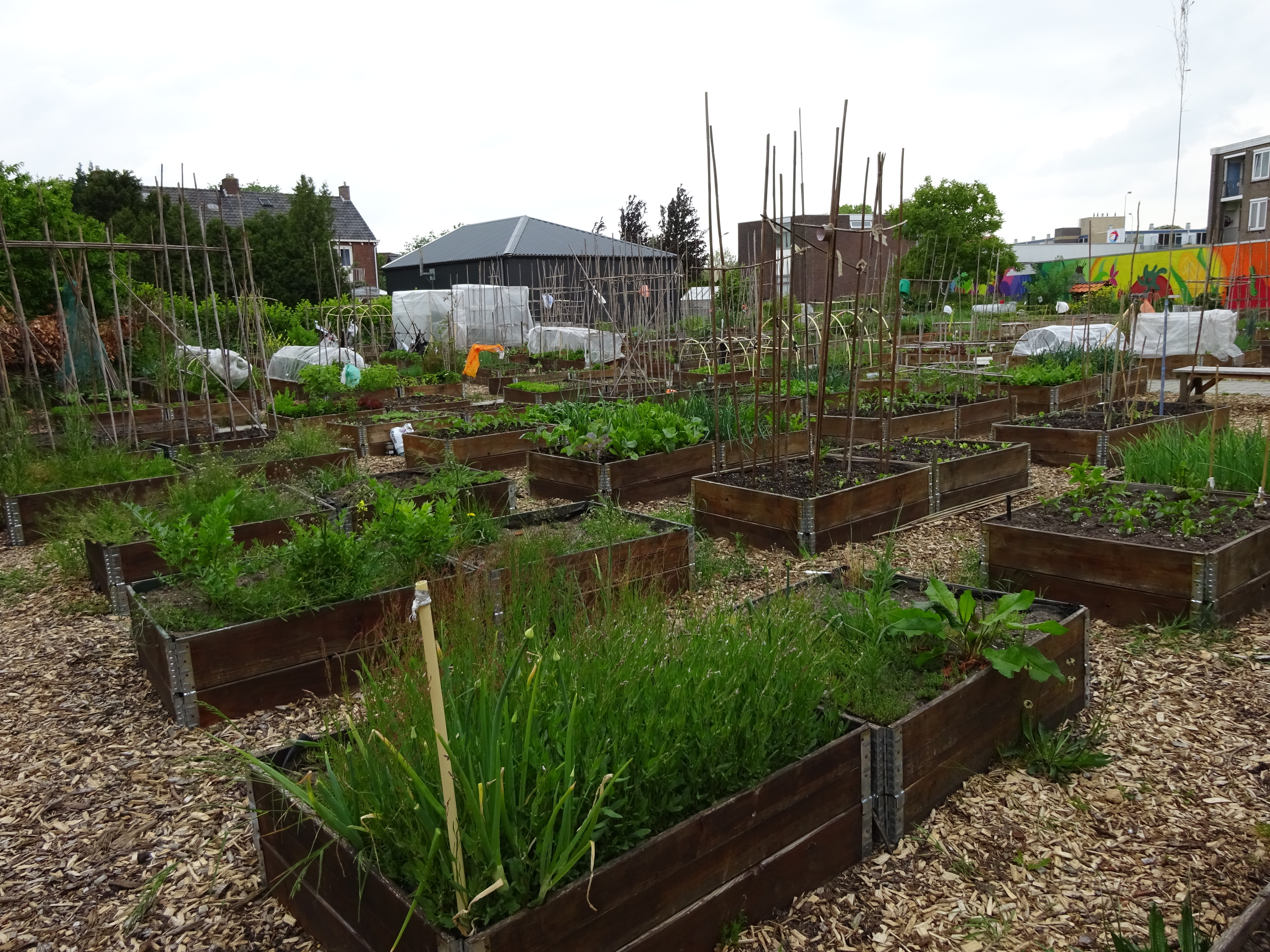 Multi-Culti Tuin in Tiel